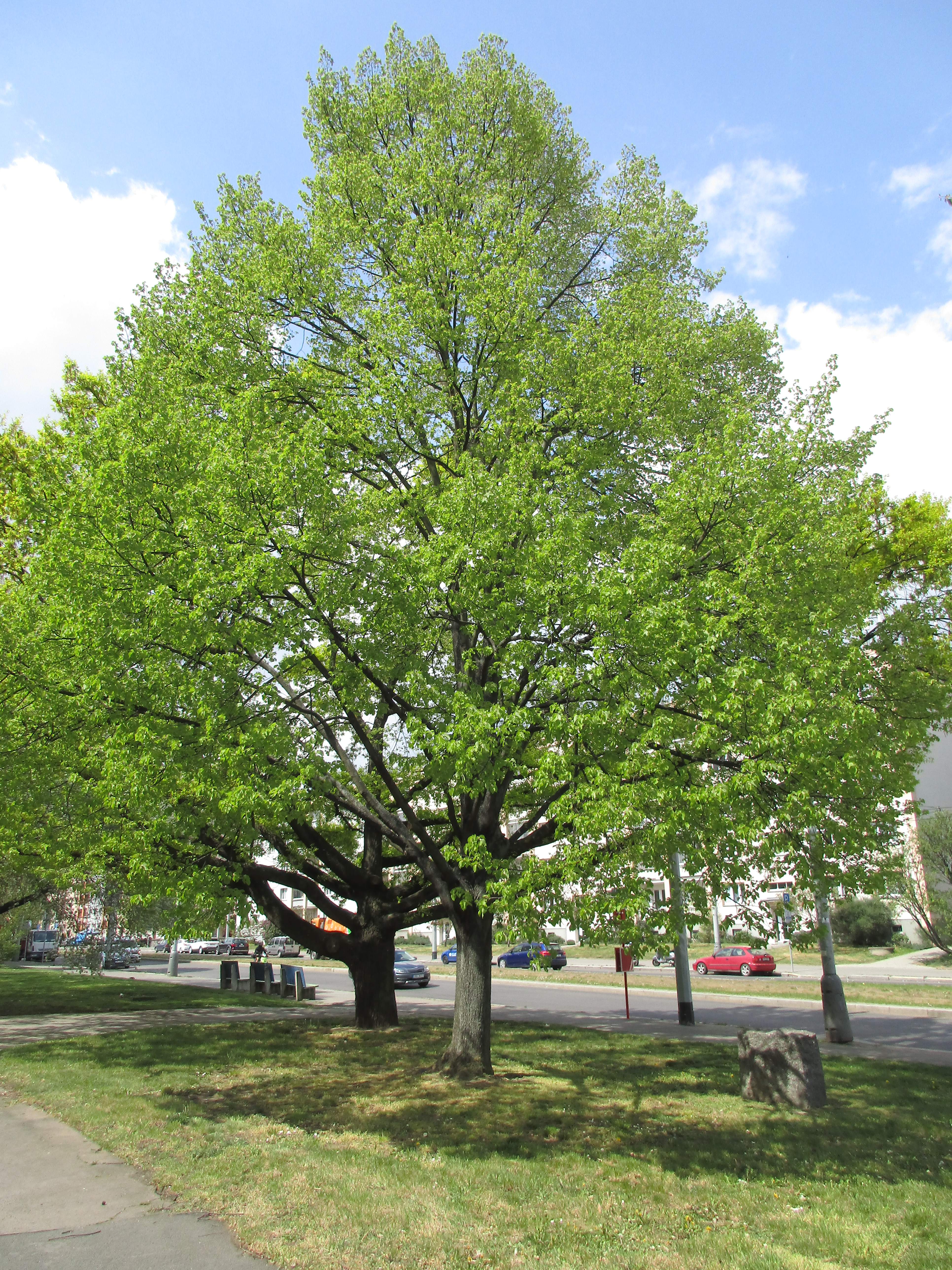 Lípa malolistá (Tilia cordata). Praha 6 - Břevnov, Sídliště Petřiny. Vysazena 28. října 1968 k 50. výročí vzniku Československé republiky. Významný strom, evidenční číslo MHMP: 14, v databázi od roku 2013.